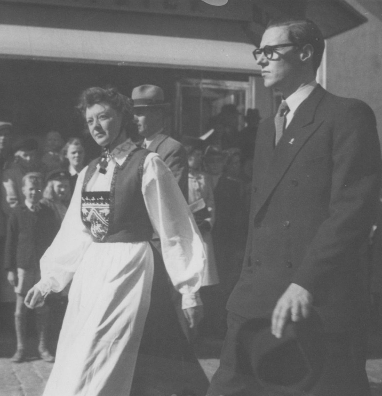 Fra feiringen av ”Norge dag” i Linköping den 16. mai 1943. Karen Rasmussen og red. Rolf Edberg i medborgartoget. RA/PA-1209/Uc/ 65/1-2/S 1007